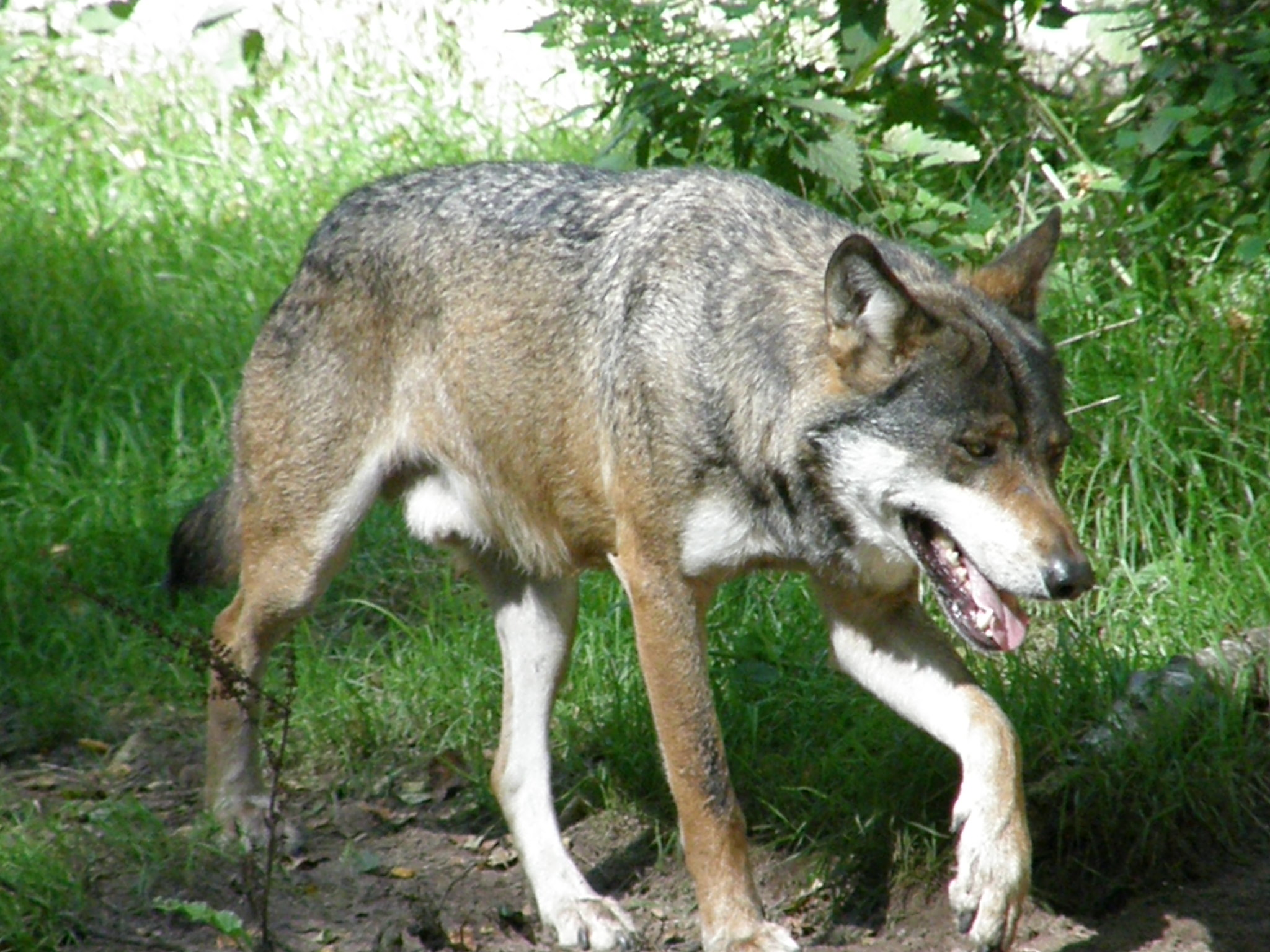 Wolf